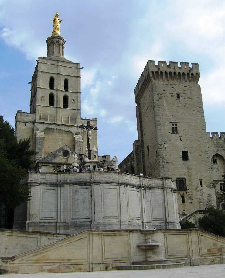 Notre-Dame des Doms à Avignon, Vaucluse, France